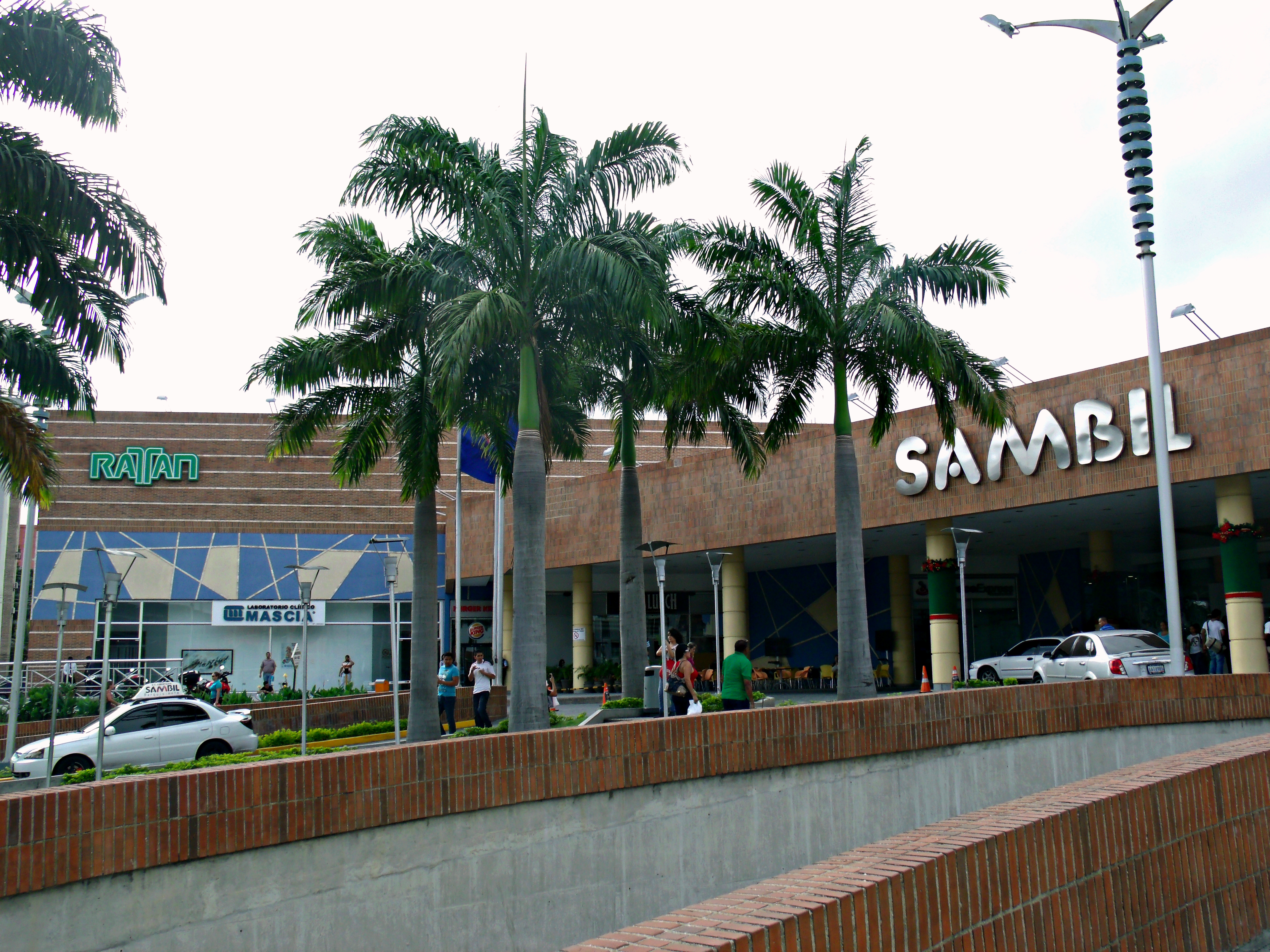 Acceso sur del centro Sambil Barquisimeto.